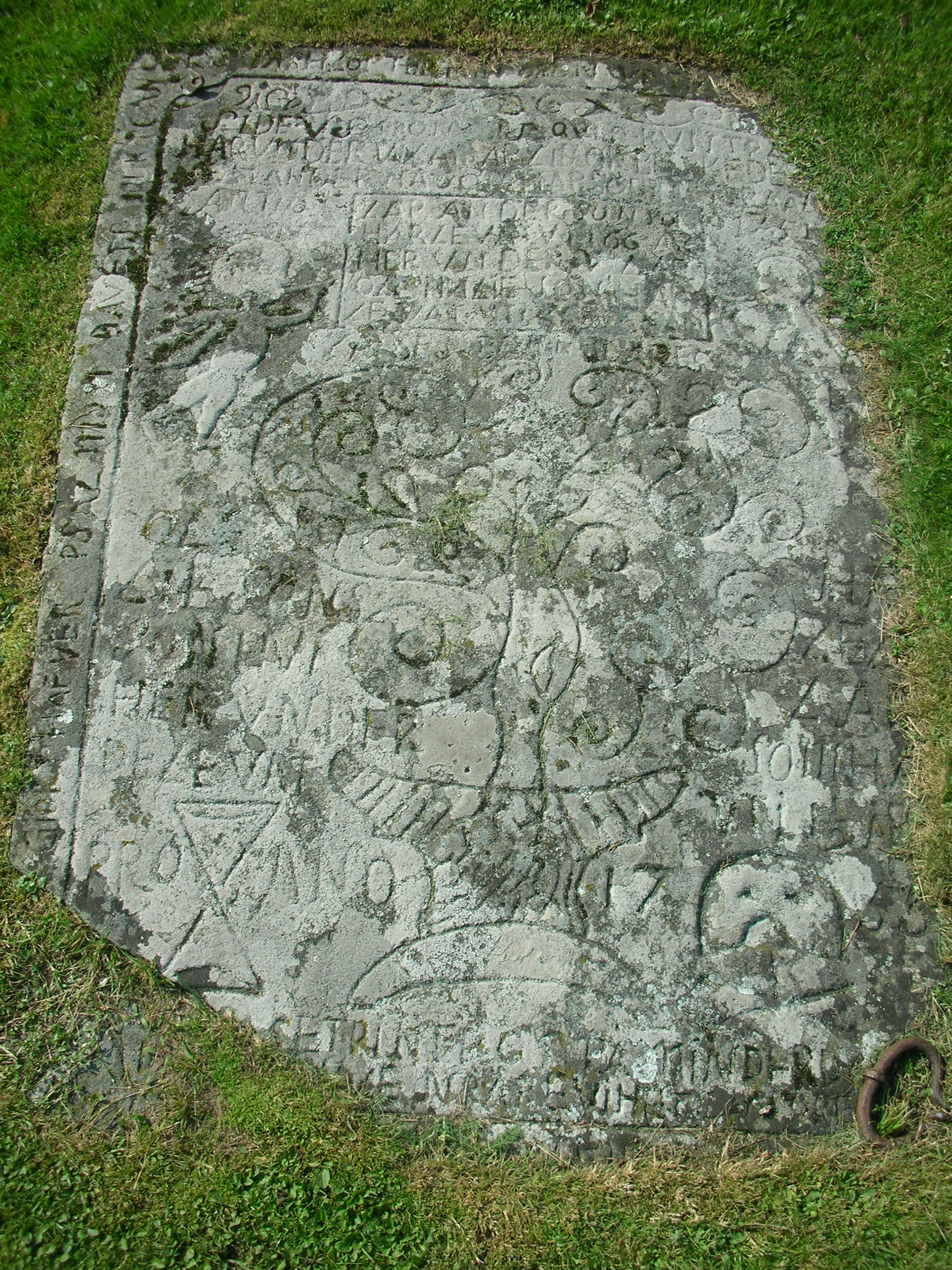 Kapargraven, i vilken det sägs ligga en kaparkapten som tjänstgjorde för Lars Gathenhielm.